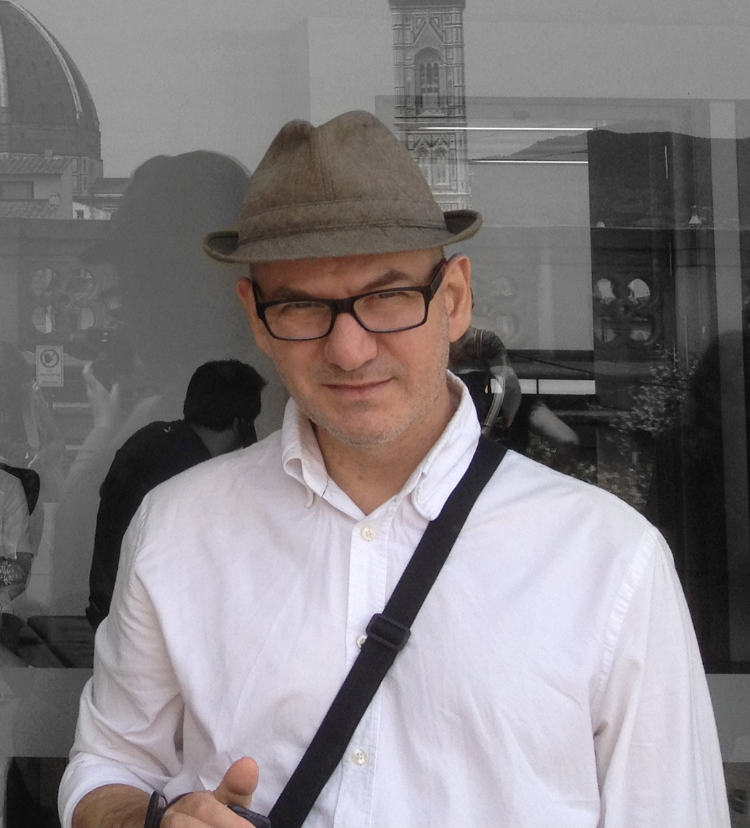 Italian Film Director Giovanni Coda